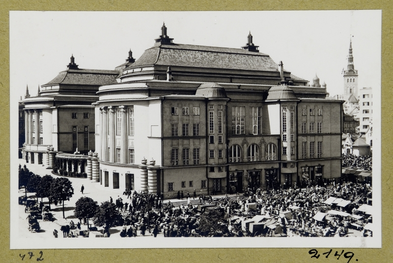 Vaade Estonia teatrile ja Uuele turule